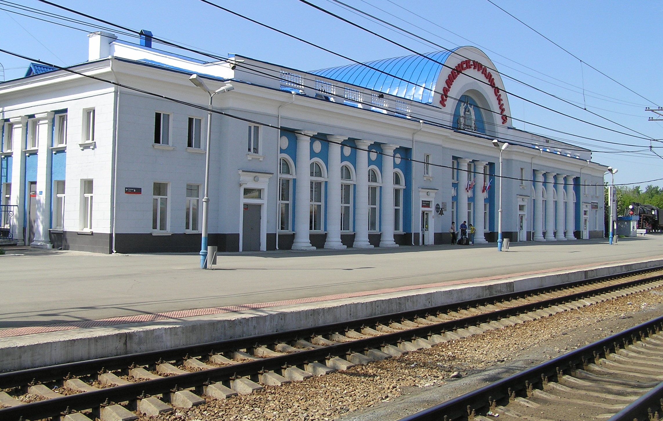 ст. Каменск-Уральский, Свердловская ж.д.